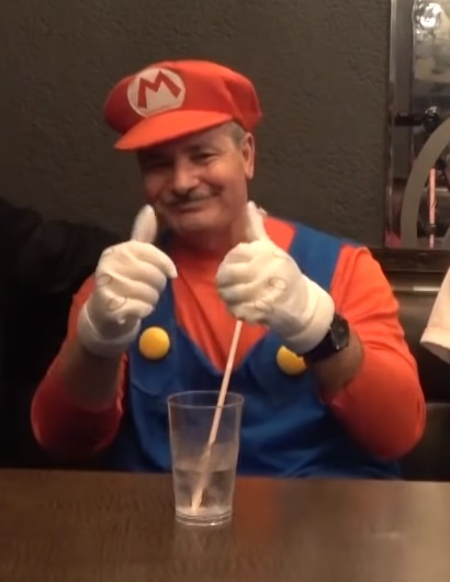 高木豊のYouTube動画にマリオの格好で出演するカルロス・ポンセ